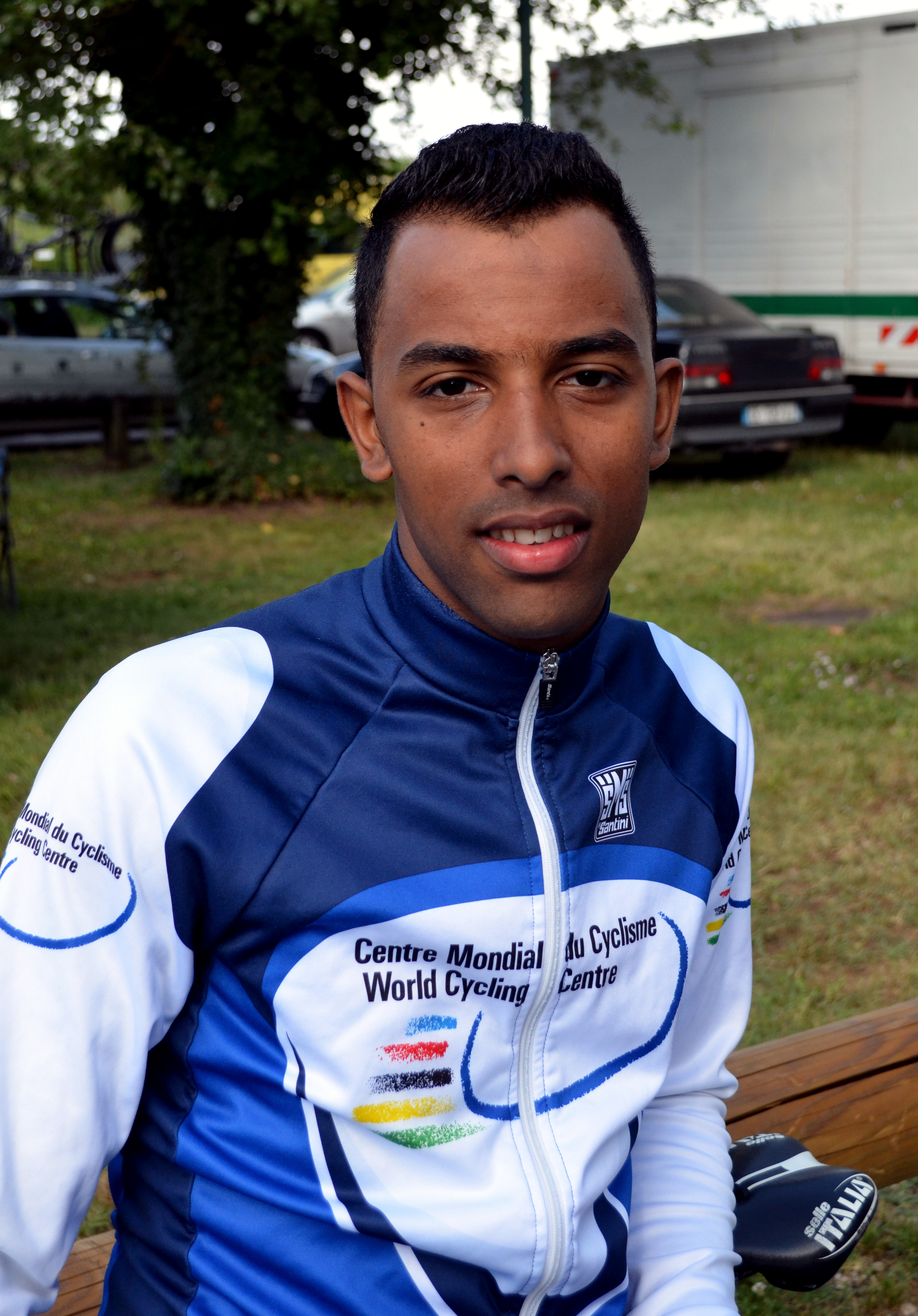 Grand Prix de Charvieu-Chavagneux 2016 : images de l'échauffement, de la course et de l'après-course : El Mehdi Chokri, second de l'épreuve.